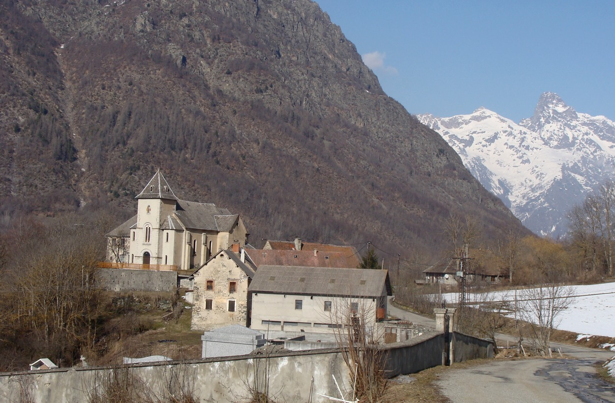 Le hameau chef-lieu de Saint-Jacques-en-Valgodemard (Hautes-Alpes). Au fond à droite le Pic d'Olan (3564 mètres).